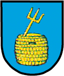 Herb Miedar (gmina Zbrosławice, powiat tarnogórski, województwo śląskie, Polska)